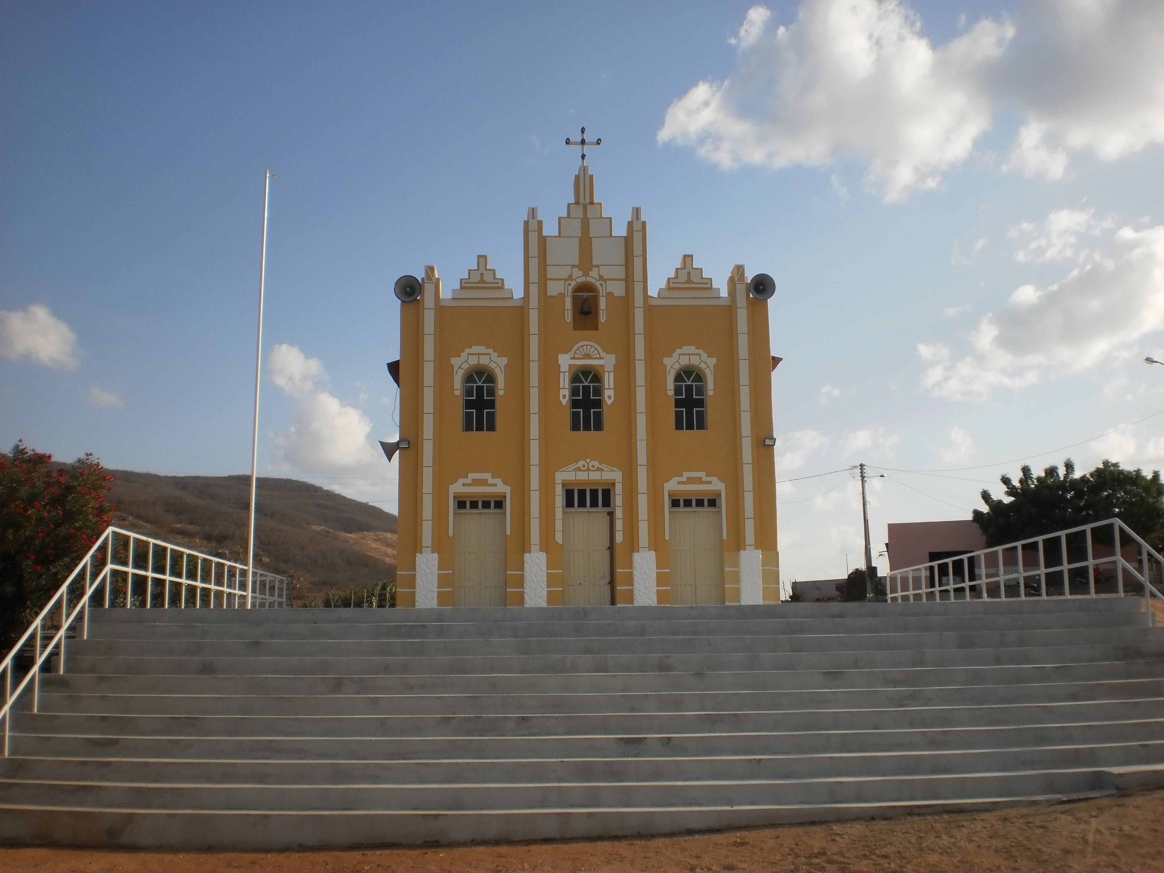 Capela de São Miguel Arcanjo, da Paróquia São Sebastião do Encanto, no Sítio Merejo, em Doutor Severiano, Rio Grande do Norte, Brasil.